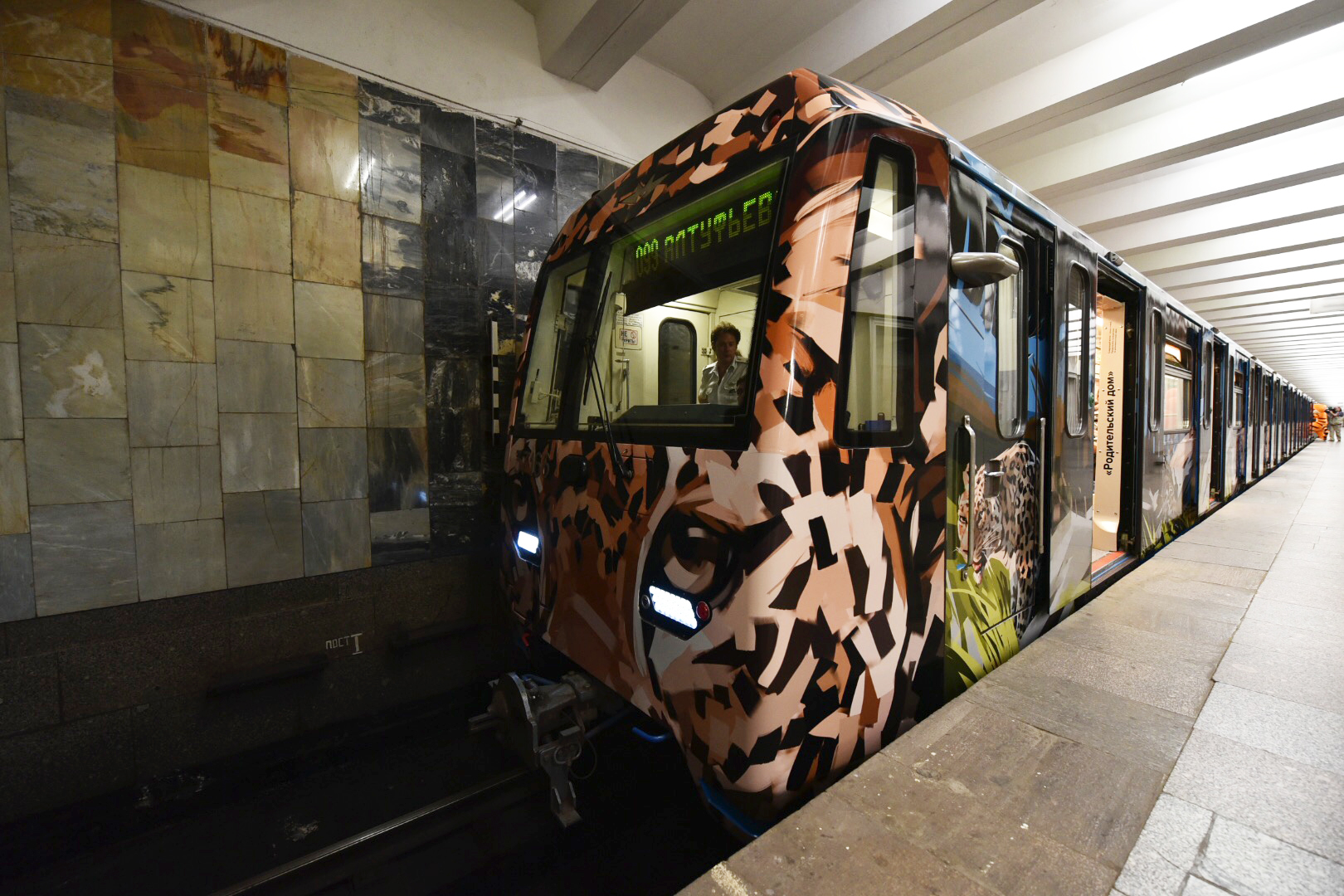 Электропоезд метро 81-760/761 "Полосатый экспресс-2" на станции. Вагон 37166 с изображением леопарда